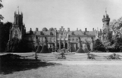 Ehemaliges neogotisches Schloss von Hülseburg im Landkreis Ludwigslust, Mecklenburg-Vorpommern. 1860 durch einen Freiherr von Campe errichtet, 1947 abgebrannt. Frontansicht.